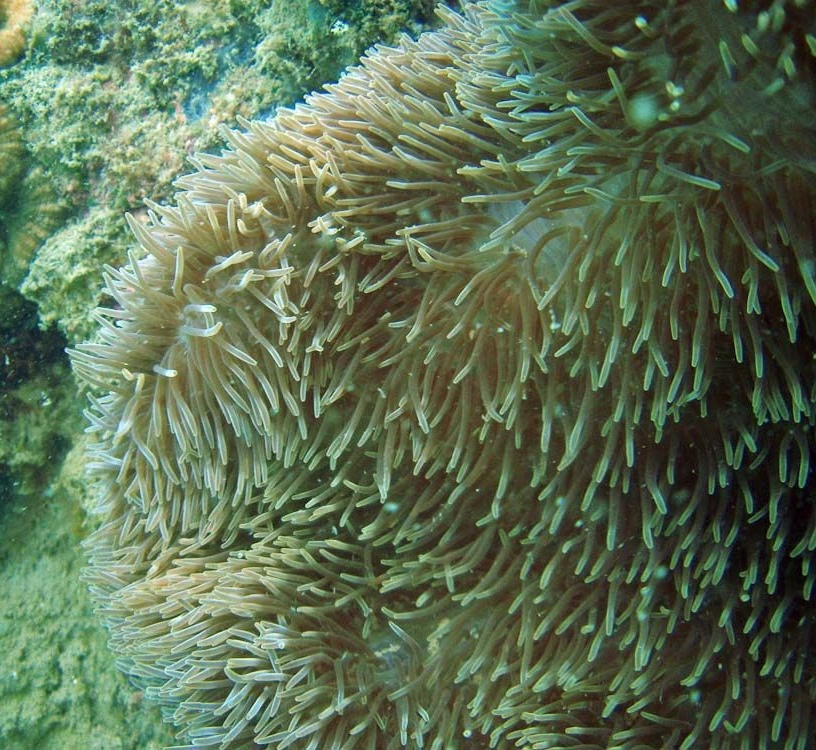 Stichodactyla gigantea, primer plano de tentáculos. Koh Phangan, Tailandia